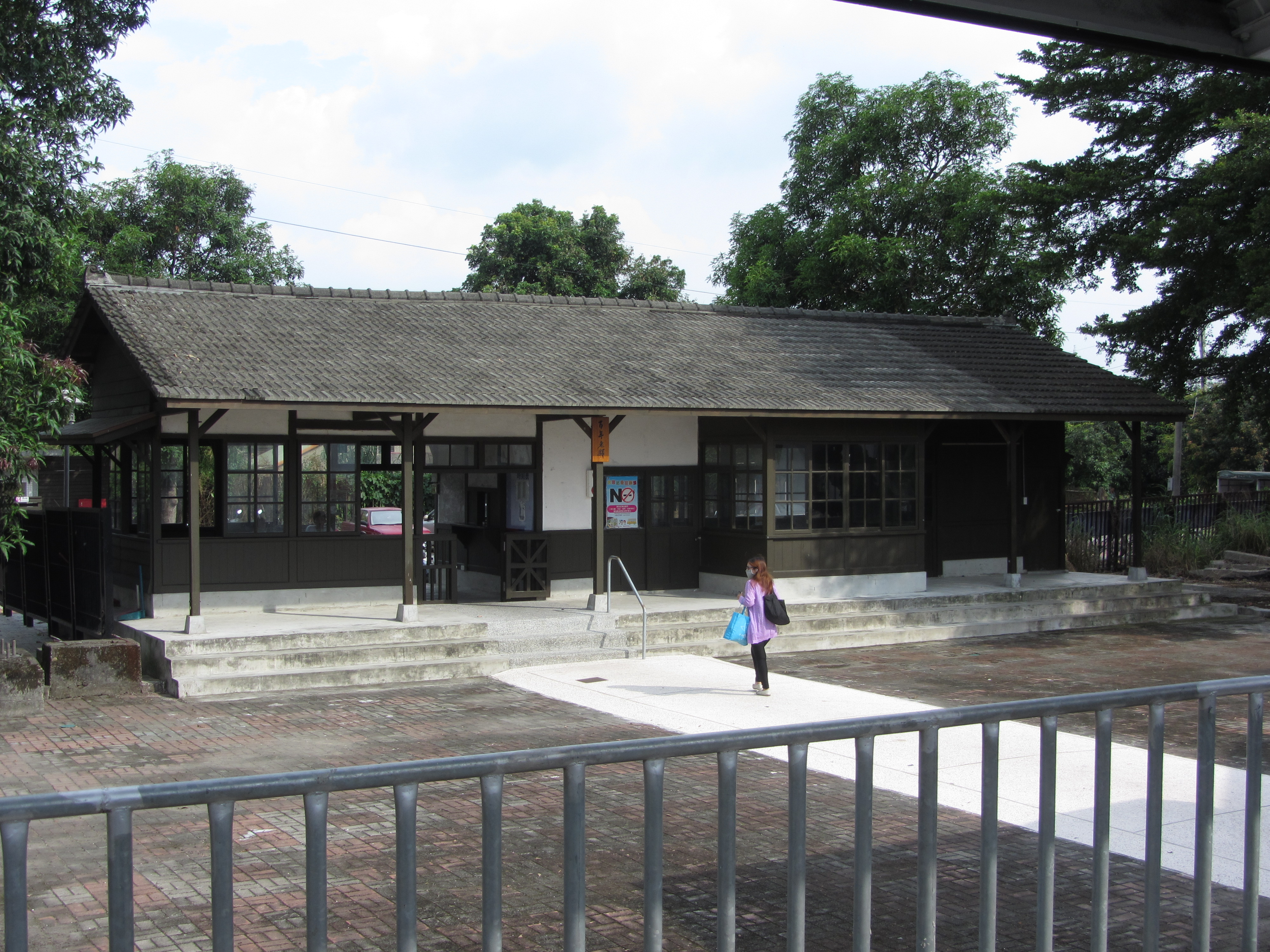 2012年12月整修完成後的石榴車站站房。